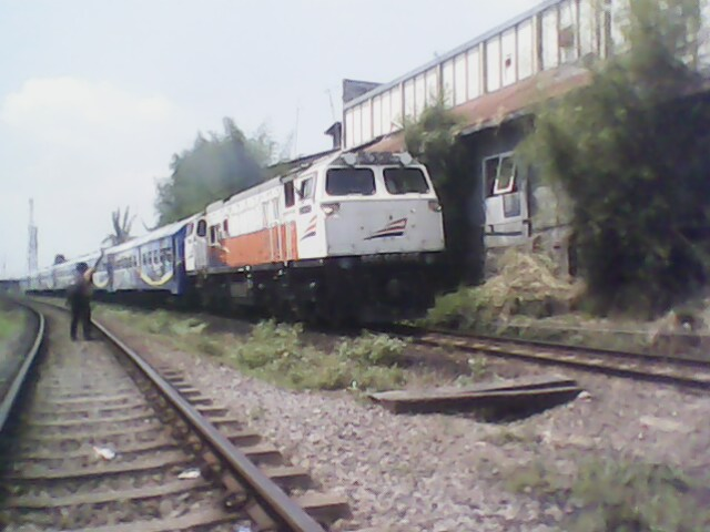 KA Penataran Ekspress lepas stasiun malang